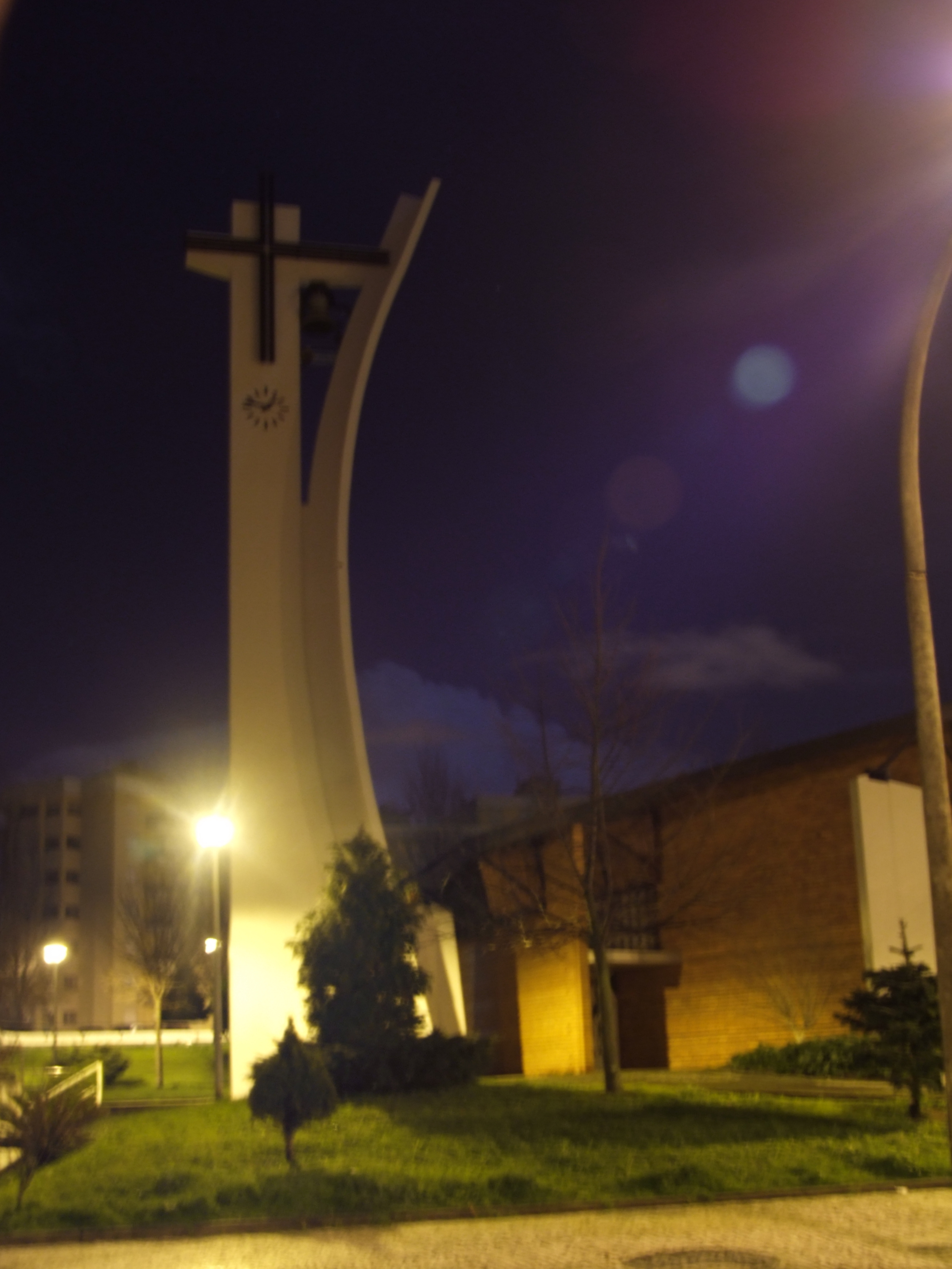 Torre da Igreja Matiz de Aldoar, freguesia de Aldoar, Porto, Portugal